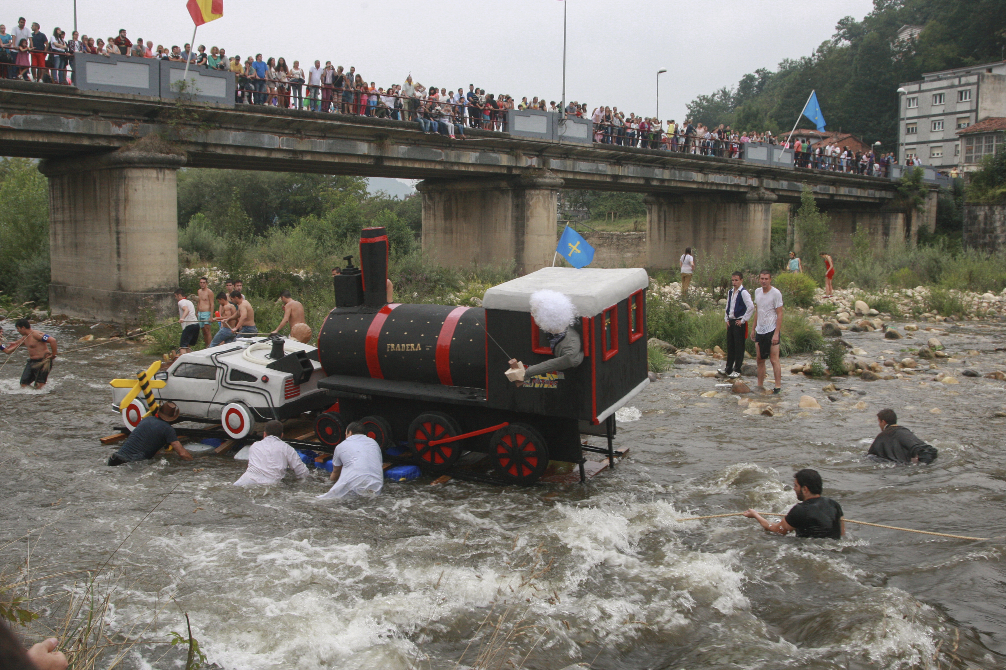 El descenso folklorico del rio Nalón en la localidad de la Pola de Laviana (Asturias) es una de las mejores representaciones culturales y festivas de todo un pueblo, Reúne a miles de personas jóvenes y mayores de toda una comarca en defensa de su tradición de cultura popular y fiestas. Es una fiesta abierta a todos los visitantes que quieran participar en conocer una rica y distinta fiesta. Representa además de ser parte de las fiestas locales el esfuerzo colectivo de ingenio y gracia, la lucha con el rio, la música, la comedia, la escenografía y los cantos acompañan a este evento. Las peñas, los vecinos y amigos se disfrazan y crean sus propias embarcaciones, con mucho humor y diversión creando un desfile de carrozas por el pueblo y que terminan bajando y surcando el río Nalón, luchando por conseguir el trofeo de la tan deseada sopera. El descenso del rio Nalón es un festival lúdico que se lleva realizando durante cincuenta años. This is a photography of a Folklore festival in Spain (Wikidata id Q5803870).